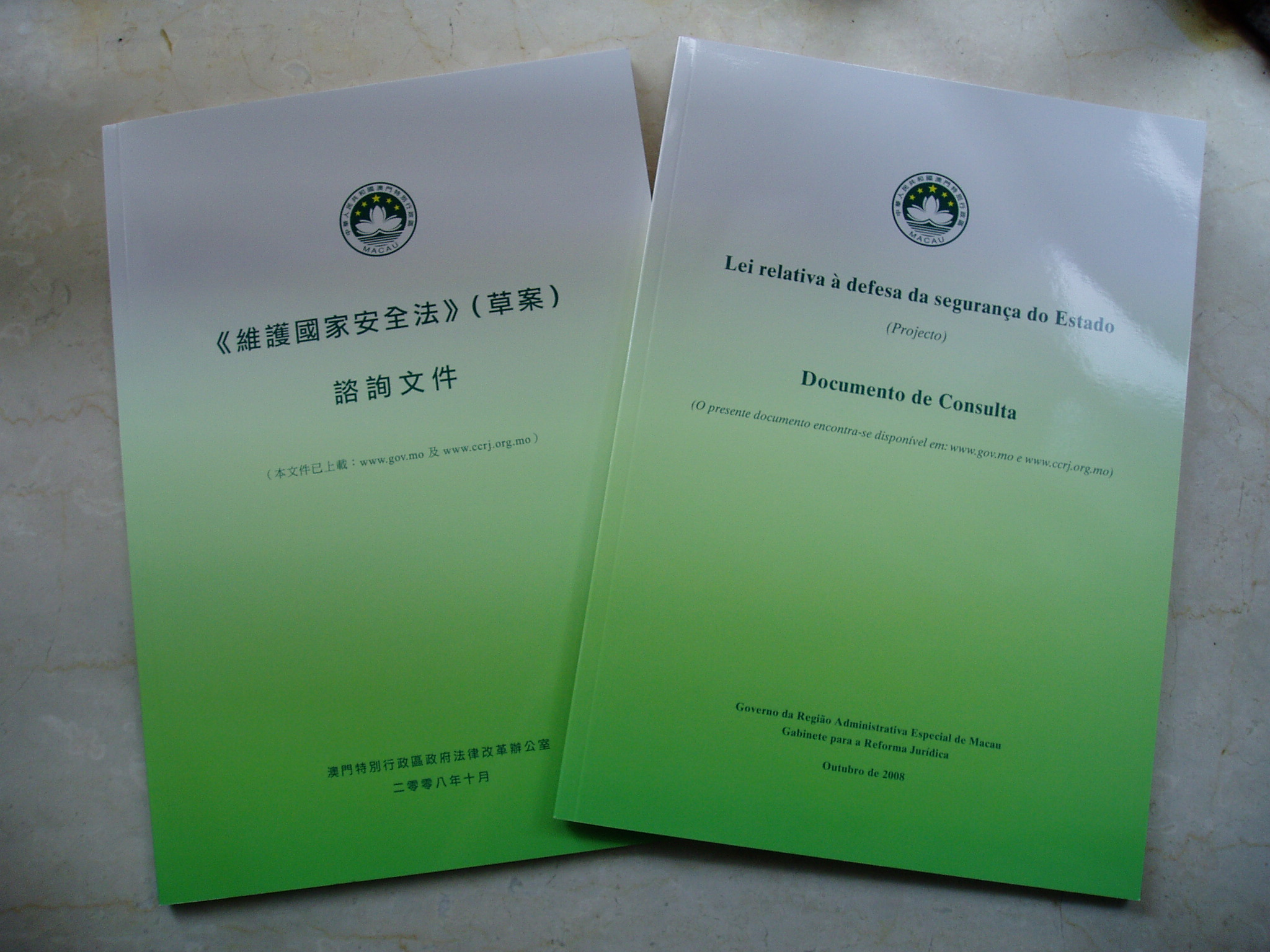 Lei relative à defesa da segurança do Estado (projecto), Documento de Consulta, em Portuguese e Chinês 中文（香港）: 《維護國家安全法》（草案）葡文及中文諮詢文本